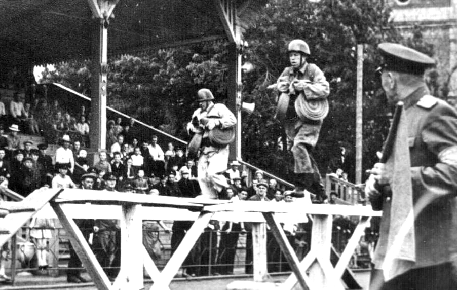 Спортсмен преодолевает 100-метровую полосу с препятствиями в форме согласно правил до 1970 г.